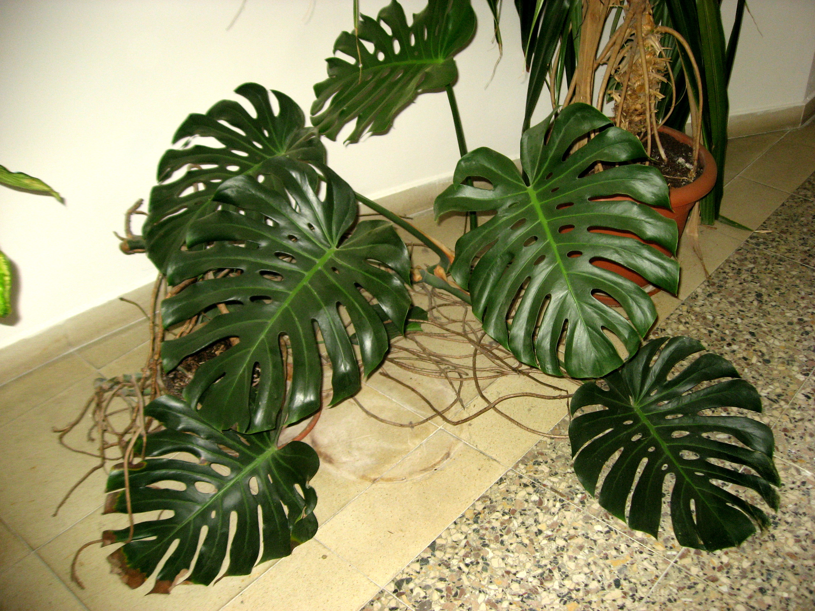 Rostlina na chodbě